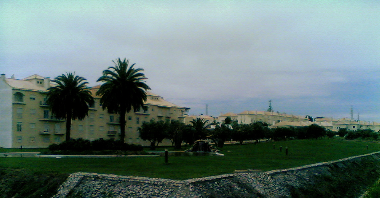 Entrada da Vila da Sobreda